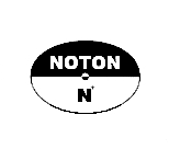 Logo des Plattenlabels "Noton"